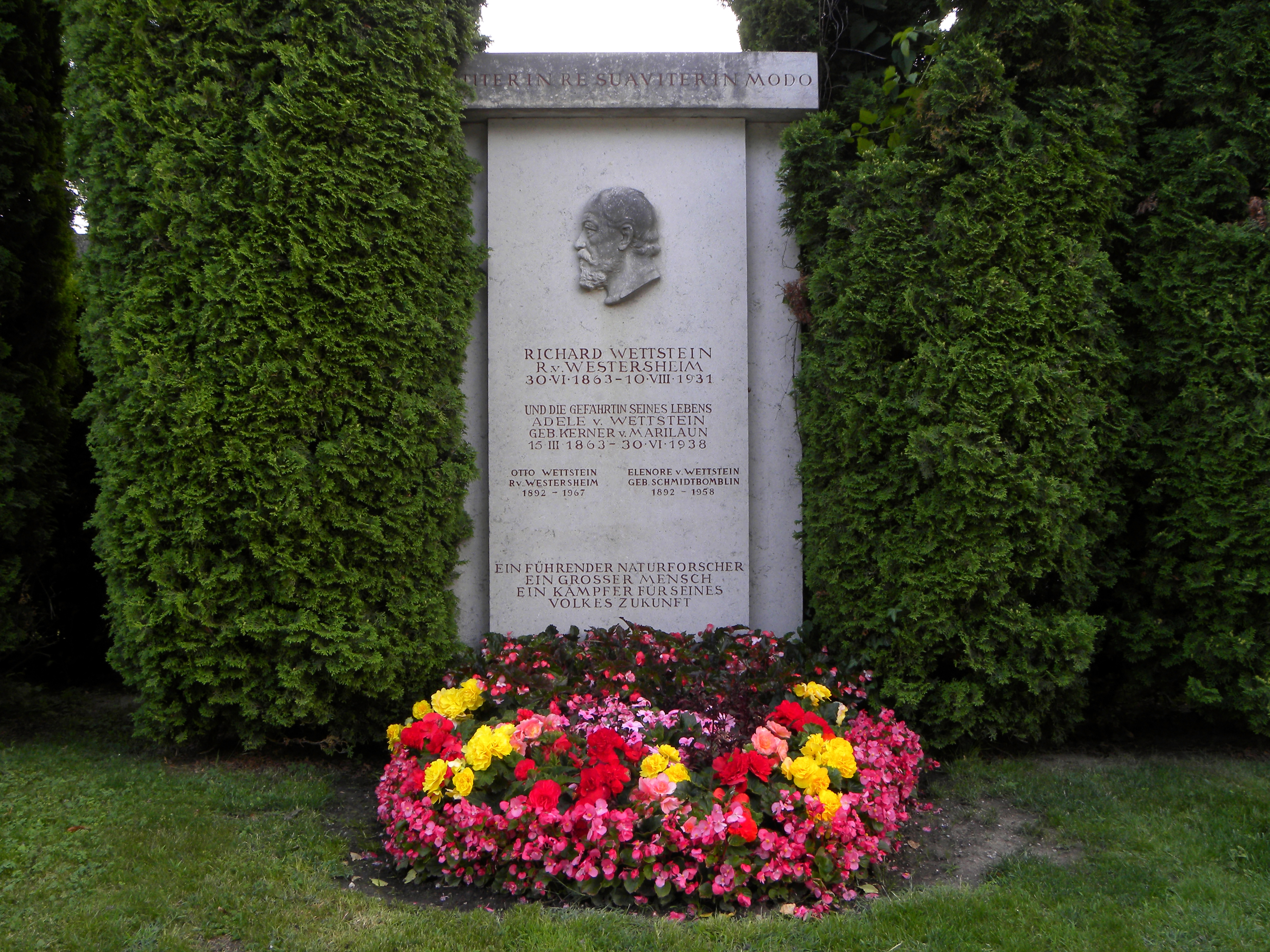 Gesamtanlage, Zentralfriedhof